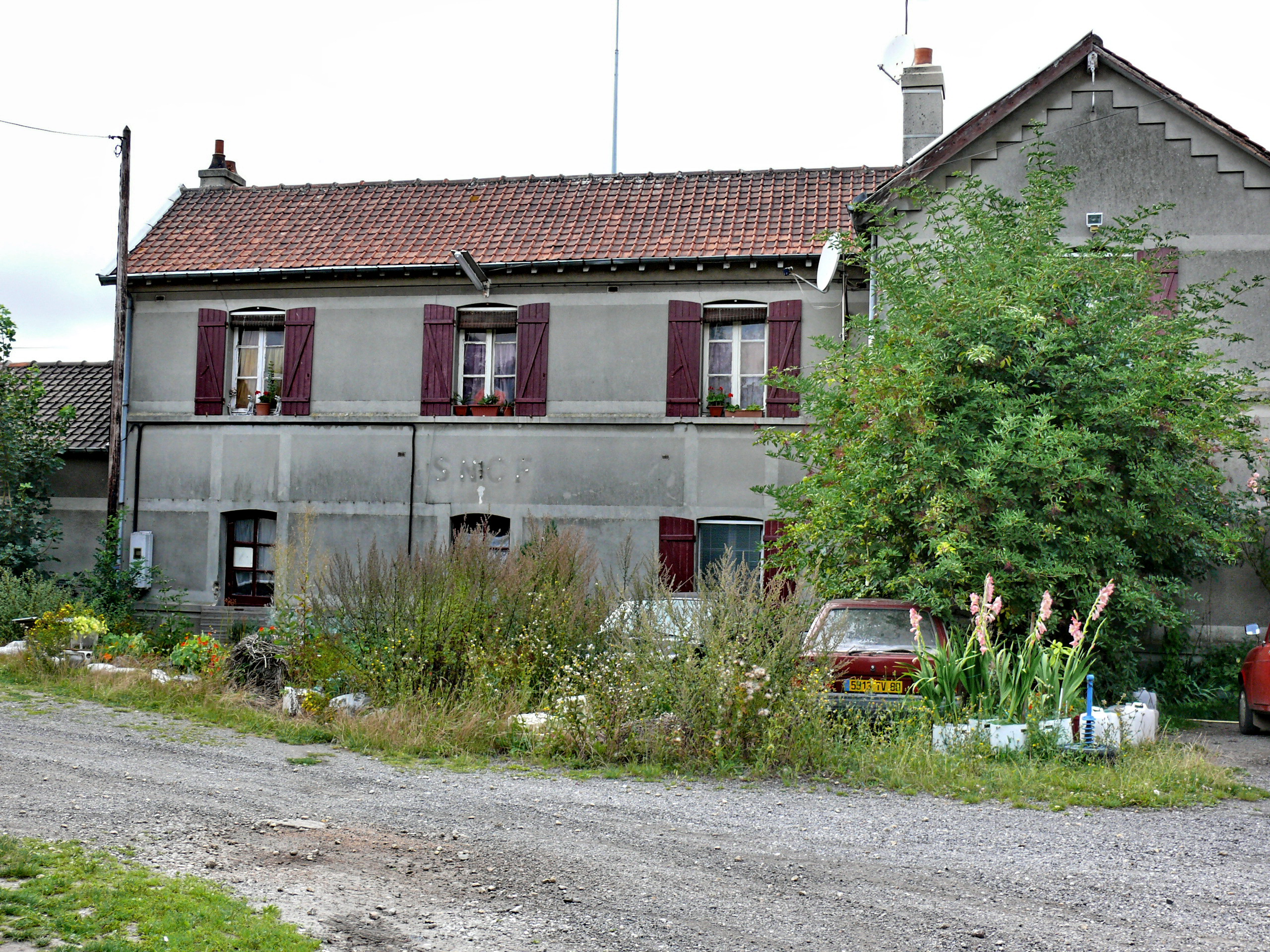 L'ancien bâtiment voyageurs désaffecté de la Gare de La Faloise (Somme - Picardie - France)